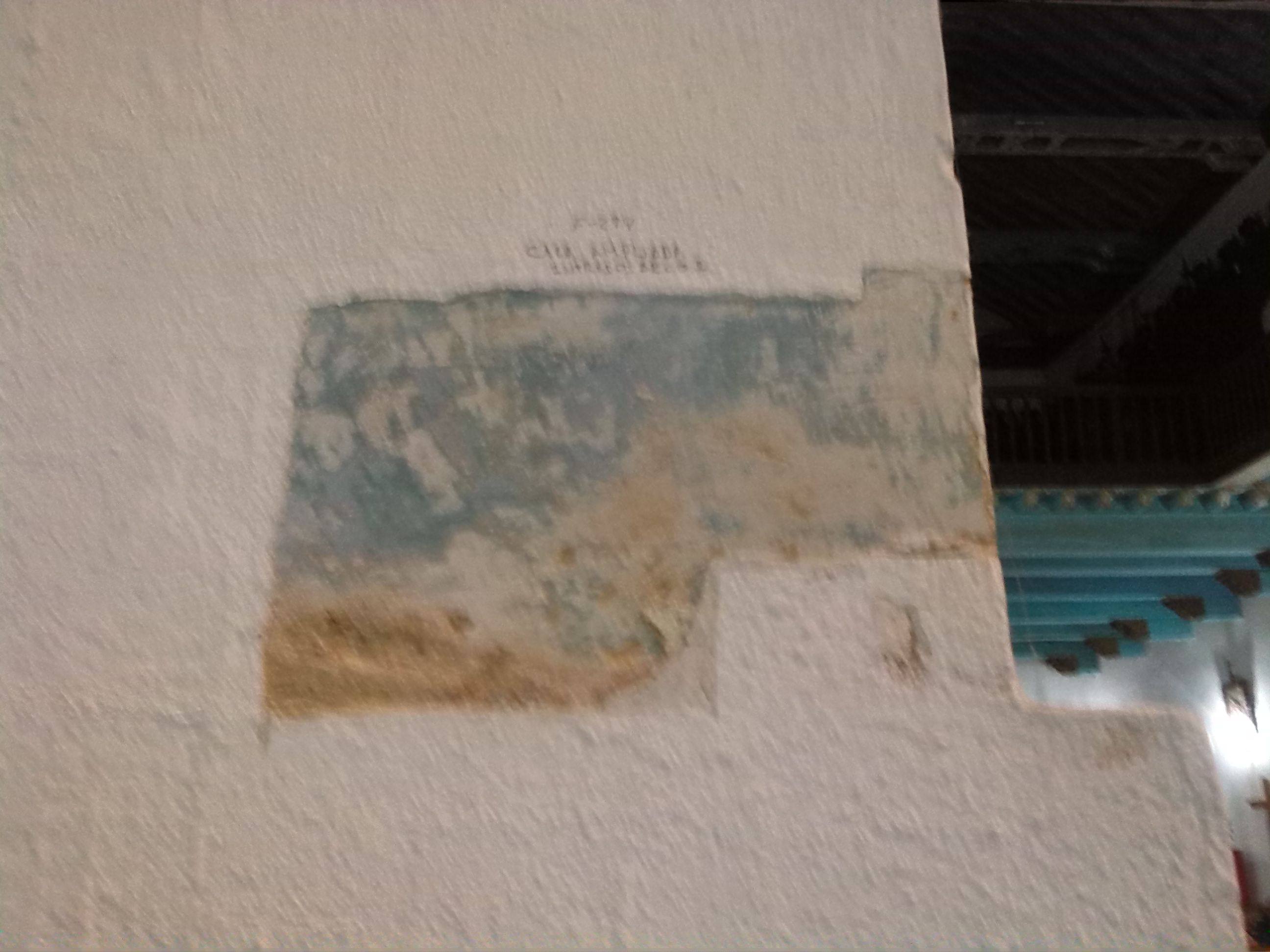 Catas estratigráficas de un muro de la iglesia de San Francisco de Tunja